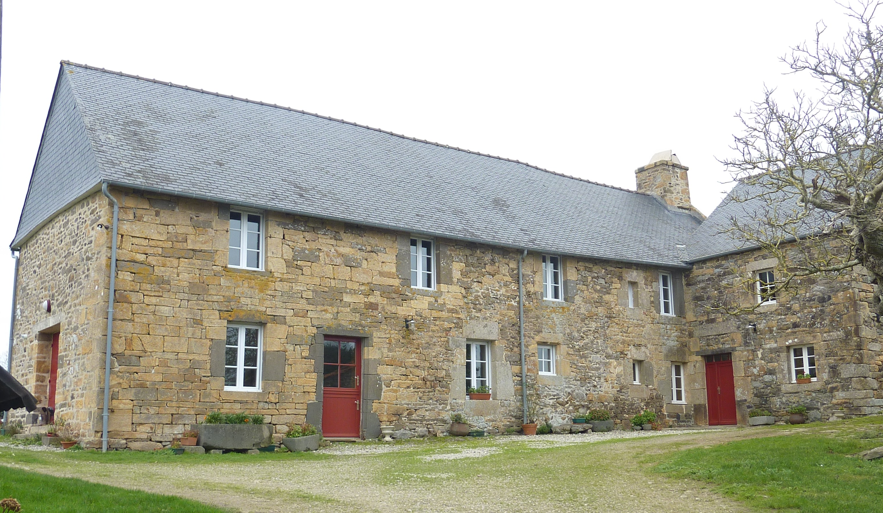 Hanvec : le manoir de Kerohant (par le passé, famille de Quelen)